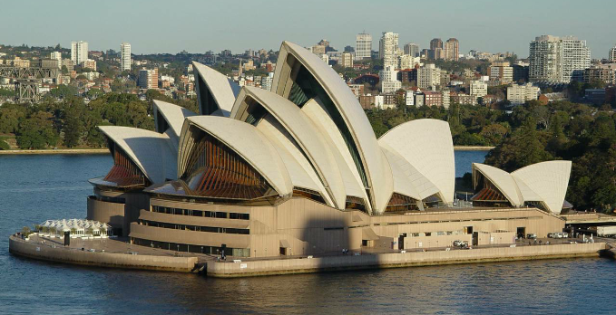 Foto José Gonçalves